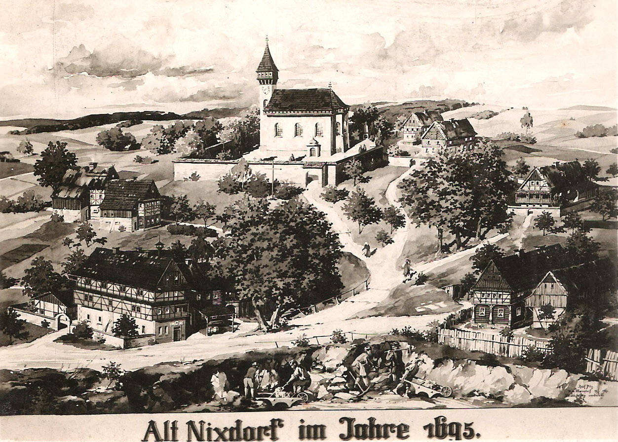 Alt Nixdorf im Jahre 1695